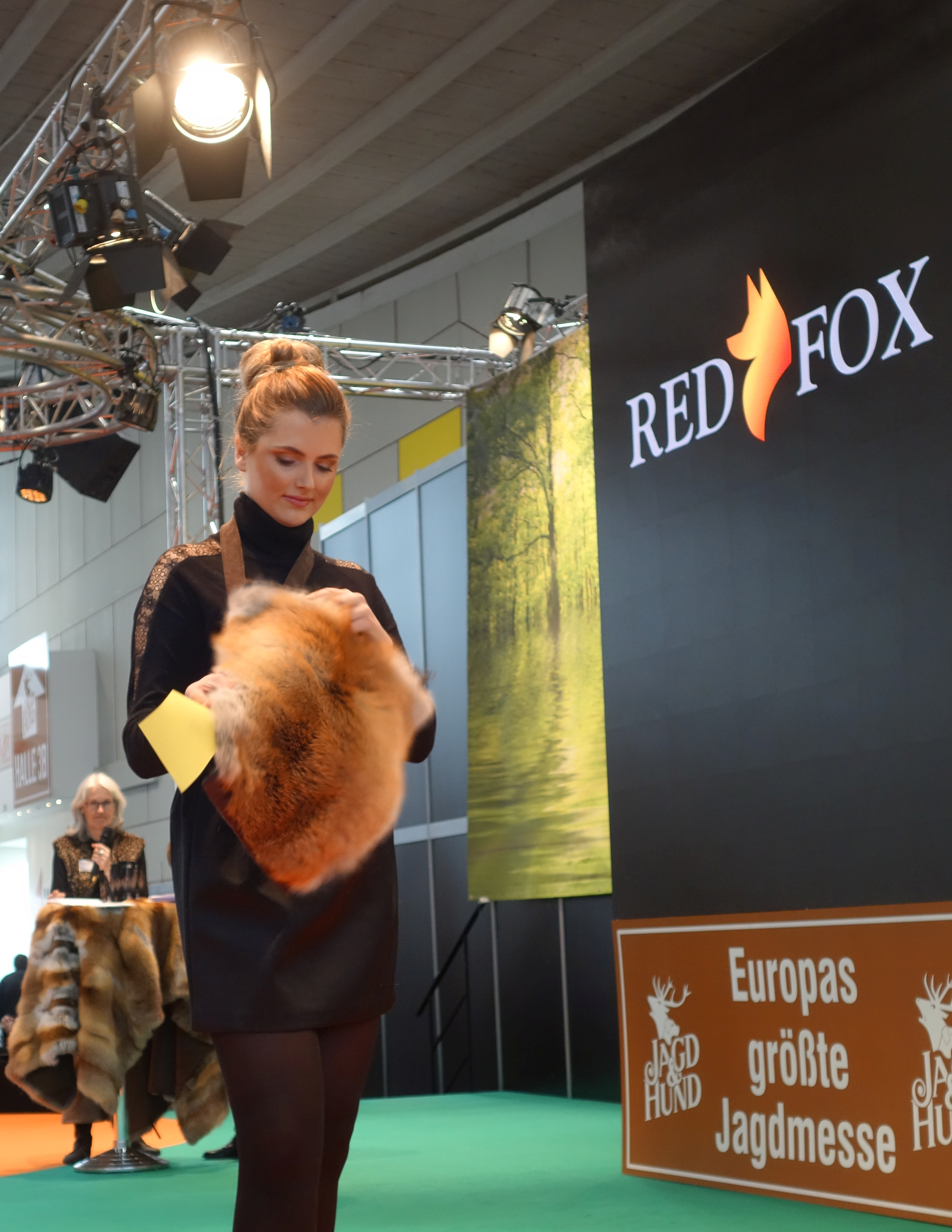 International German Red Fox Award 2018, Jagd & Hund 2018, Dortmund Westfalenhallen. Lodenmuff mit Patronentasche (Auszubildender der Firma Mode + Pelz Mersmann, Münster).